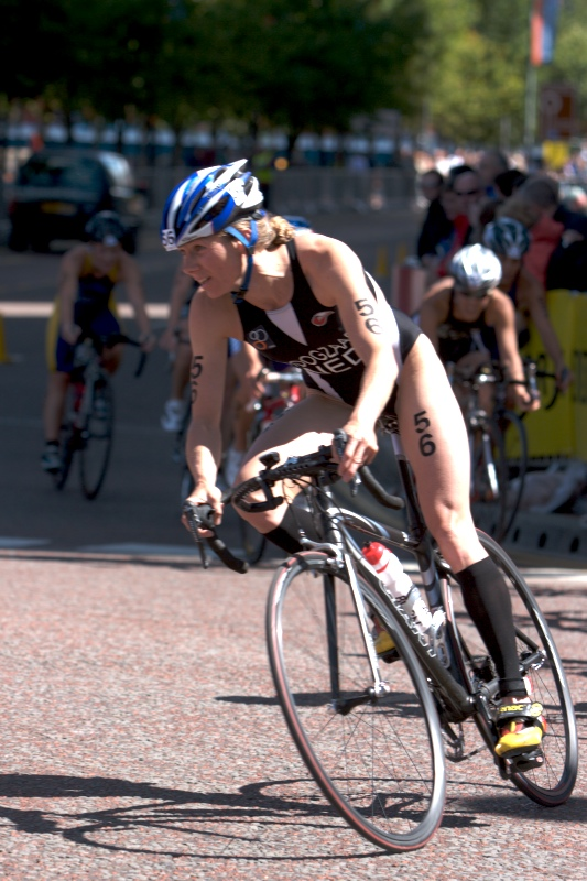 Dutch athlete Wieke Hoogzaad